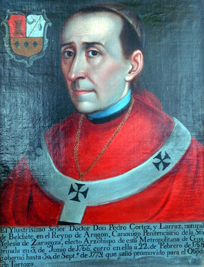 Pedro Cortés y Larraz (1712-1787), arzobispo de Guatemala.